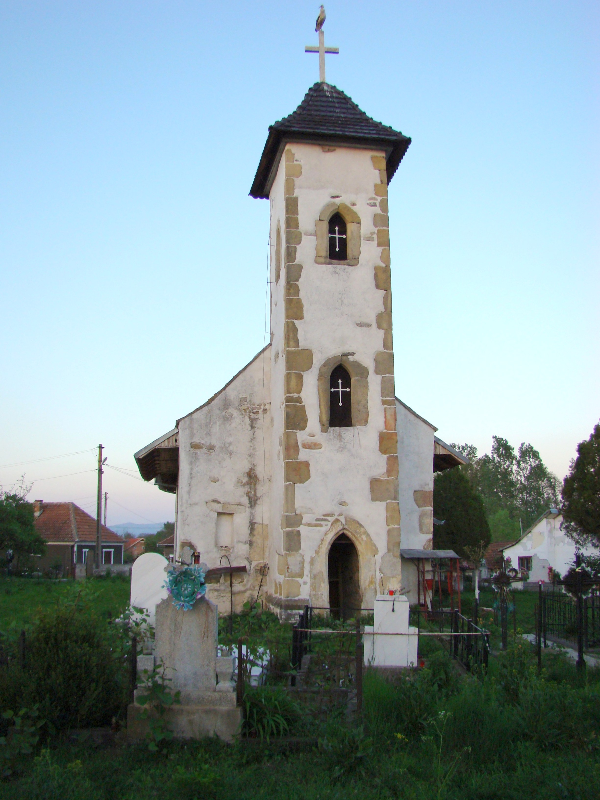 Biserica "Pogorârea Sfântului Duh", sat OSTROV; comuna RÂU DE MORI 01